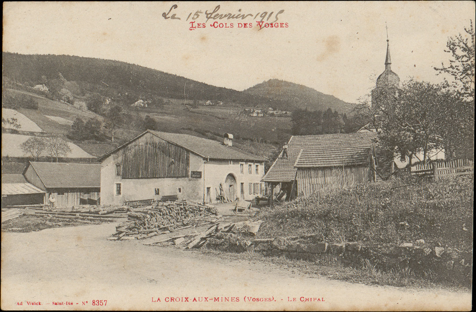 Numérisation de la carte postale 000004270 de la bmi Epinal-Golbey